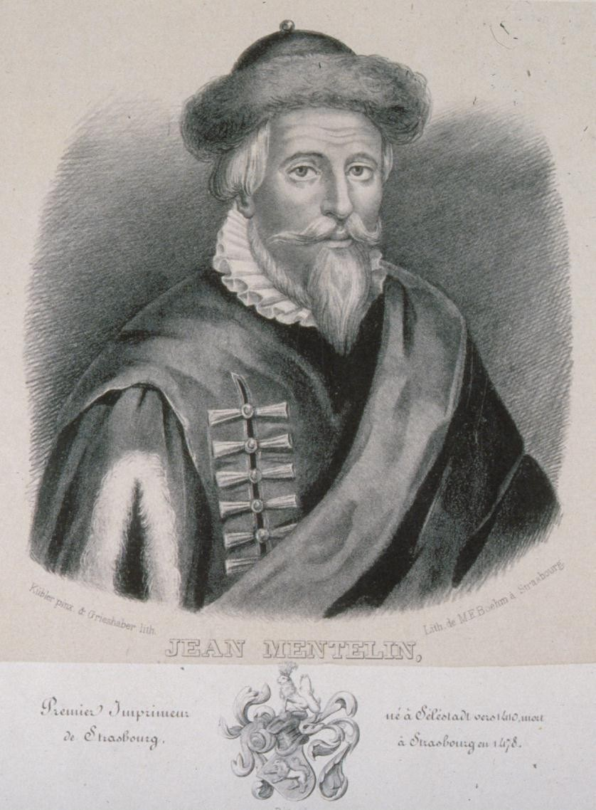 Jean Mentelin, premier imprimeur de Strasbourg, né à Sélestat en 1410 env. mort à Strasbourg en 1478. Strasbourg : M.F. Bœhm (lithographe), 1850. 39,5 x 29,2 cm